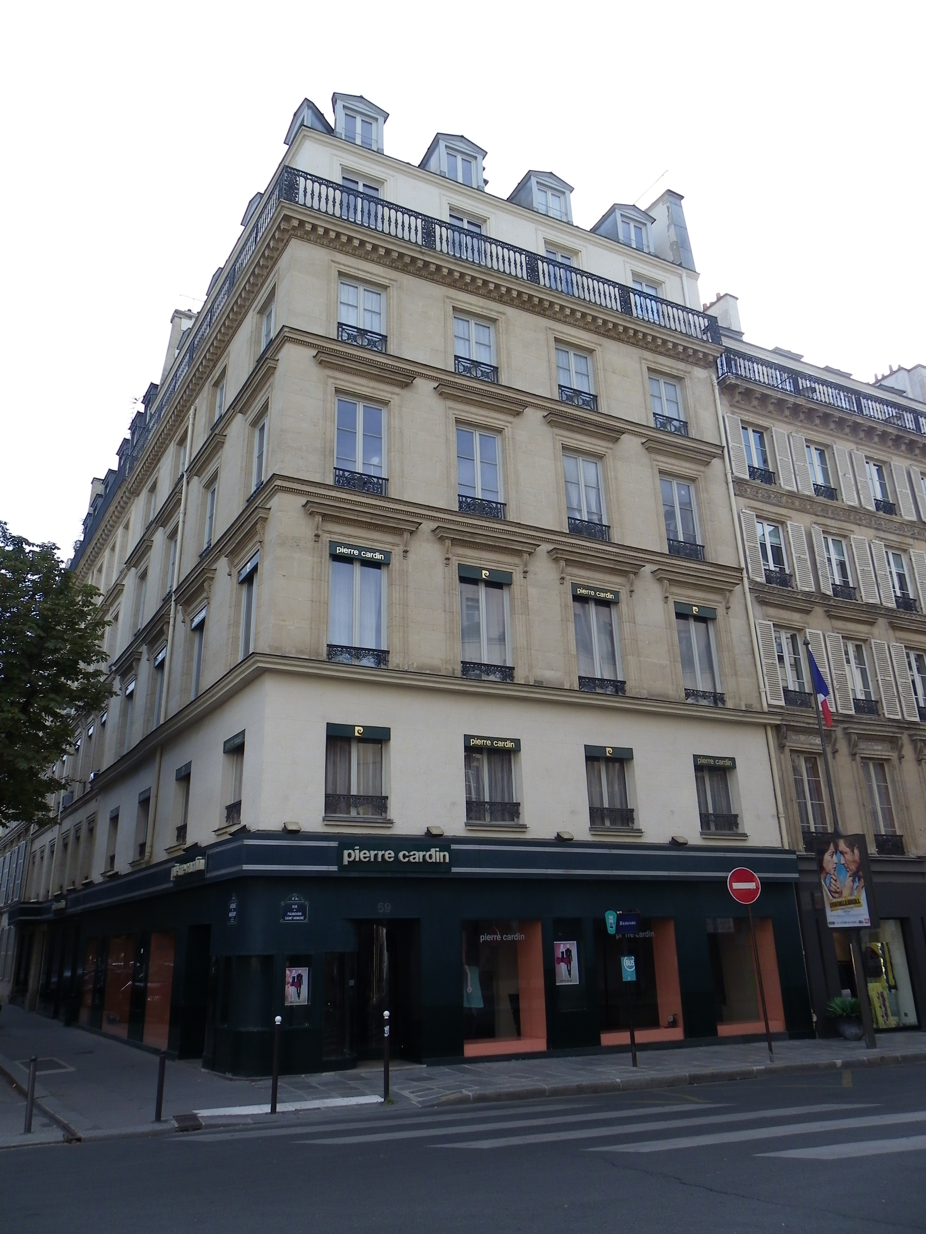 Boutique Pierre Cardin, 59 rue du Faubourg-Saint-Honoré, angle avenue de Marigny dans le 8e arrondissement de Paris